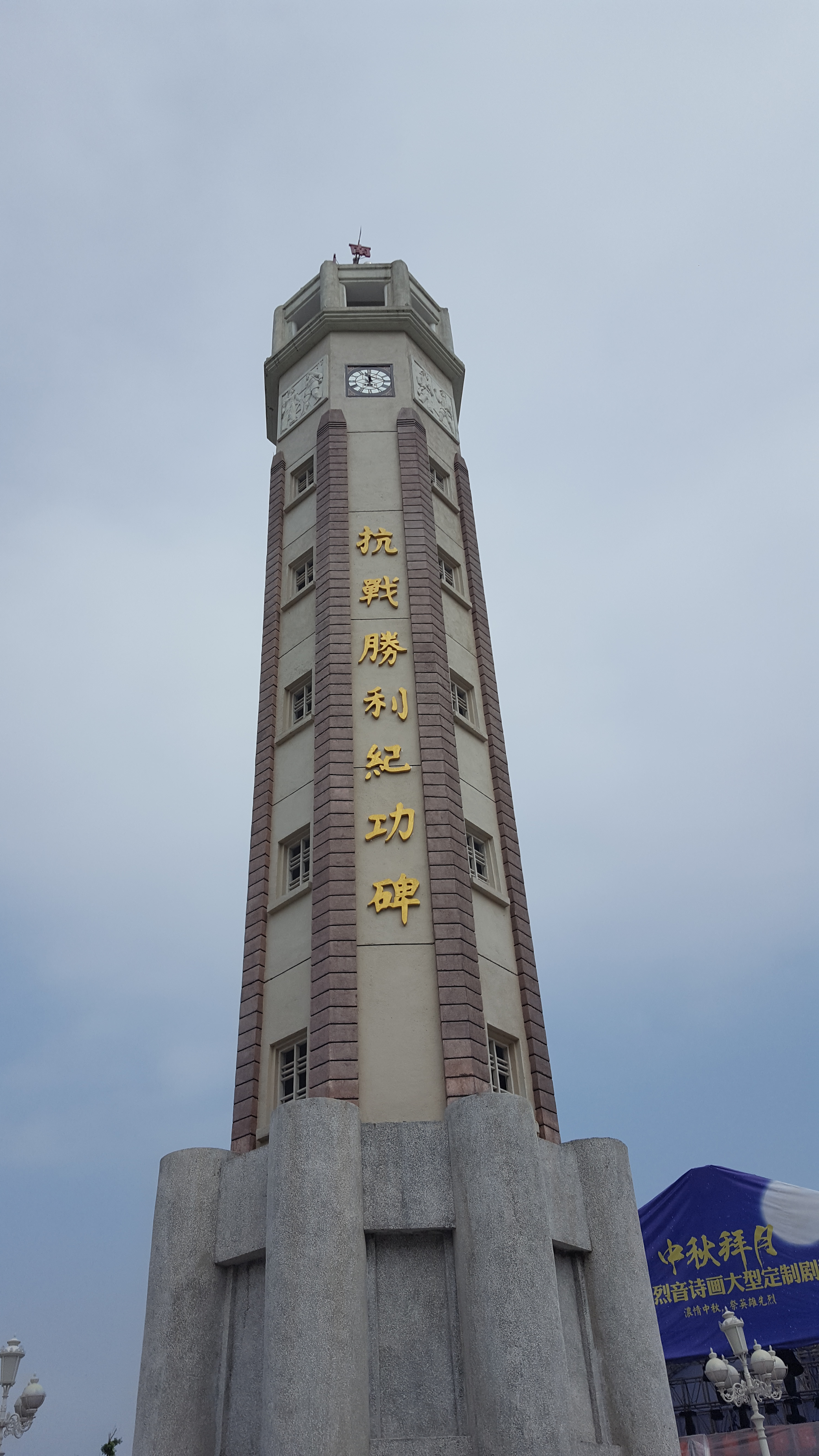 中文（中国大陆）: 位于两江新区两江影视城民国街内的仿造的抗战胜利纪功碑